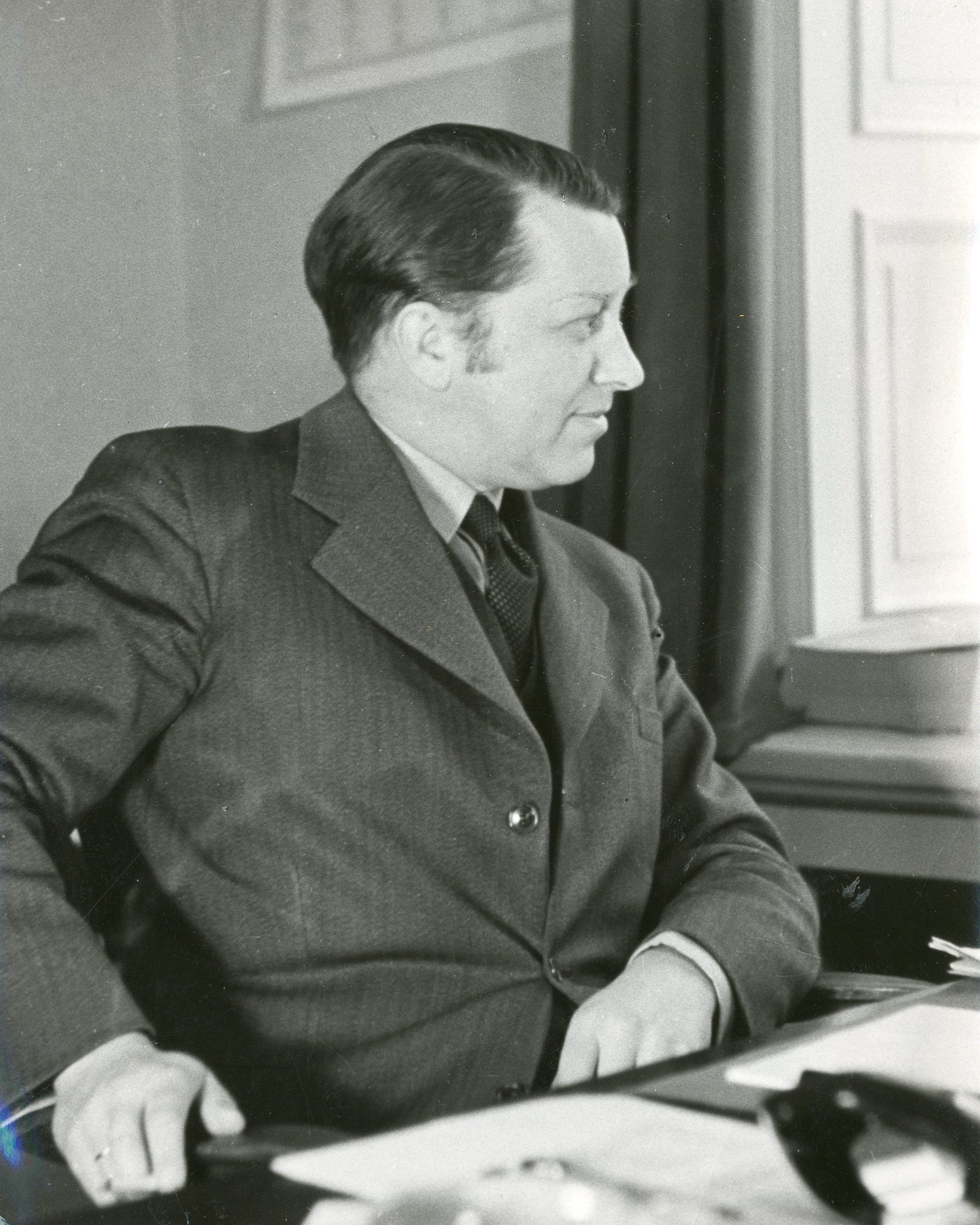 Jens Schive, norsk presseattache i Stockholm. RA/PA-1209/Uc/66/7/S 285